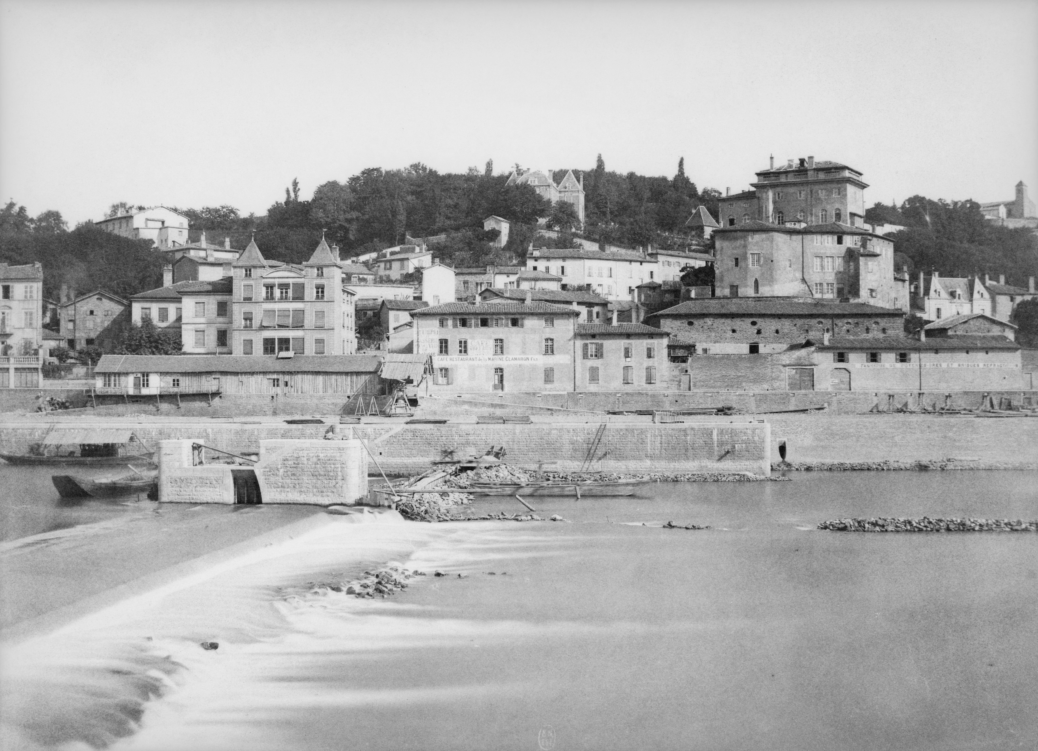 Le barrage de l'Île-Barbe et Cuire-le-Bas.